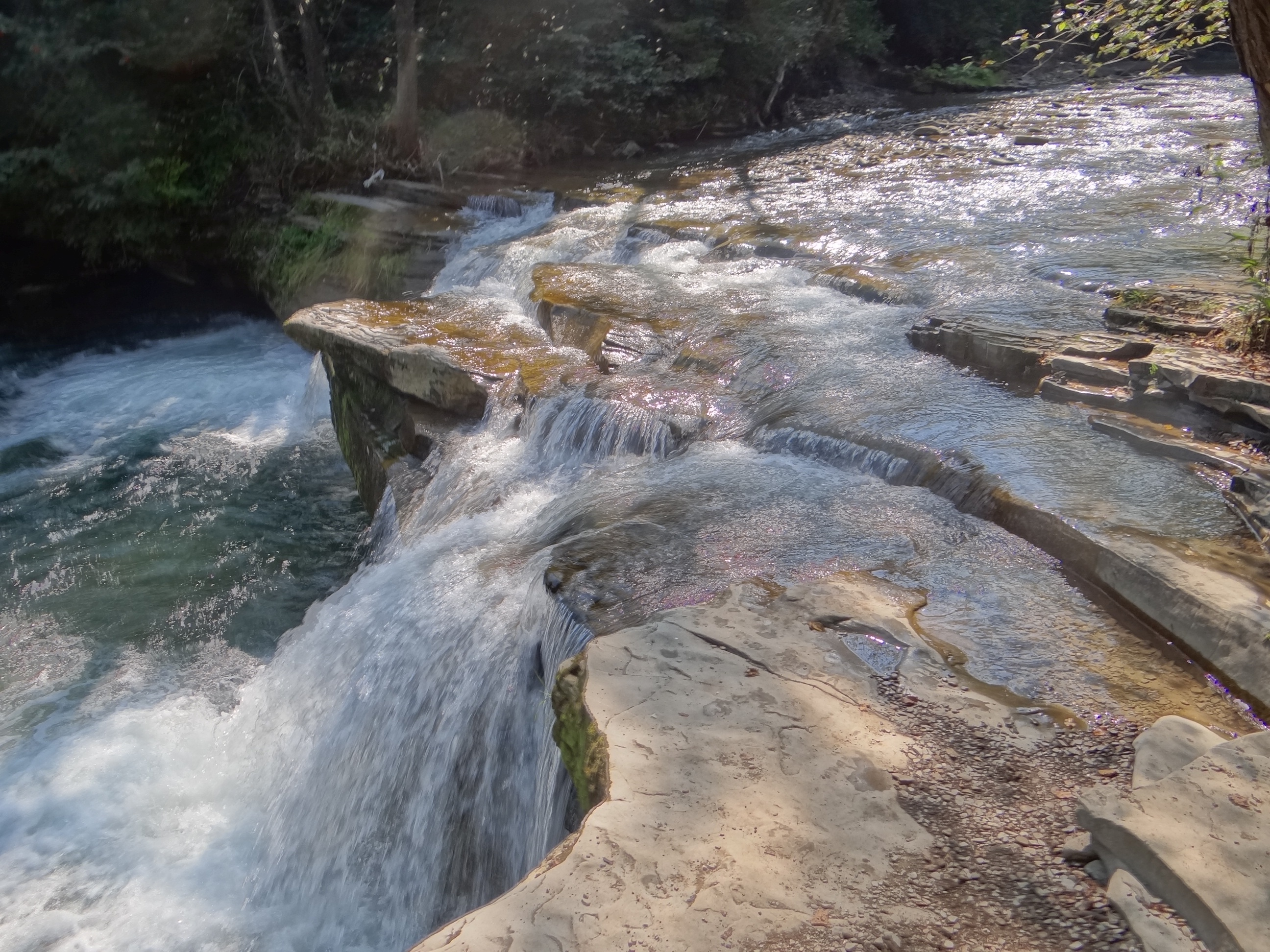 Wodospad na Kacwiniance